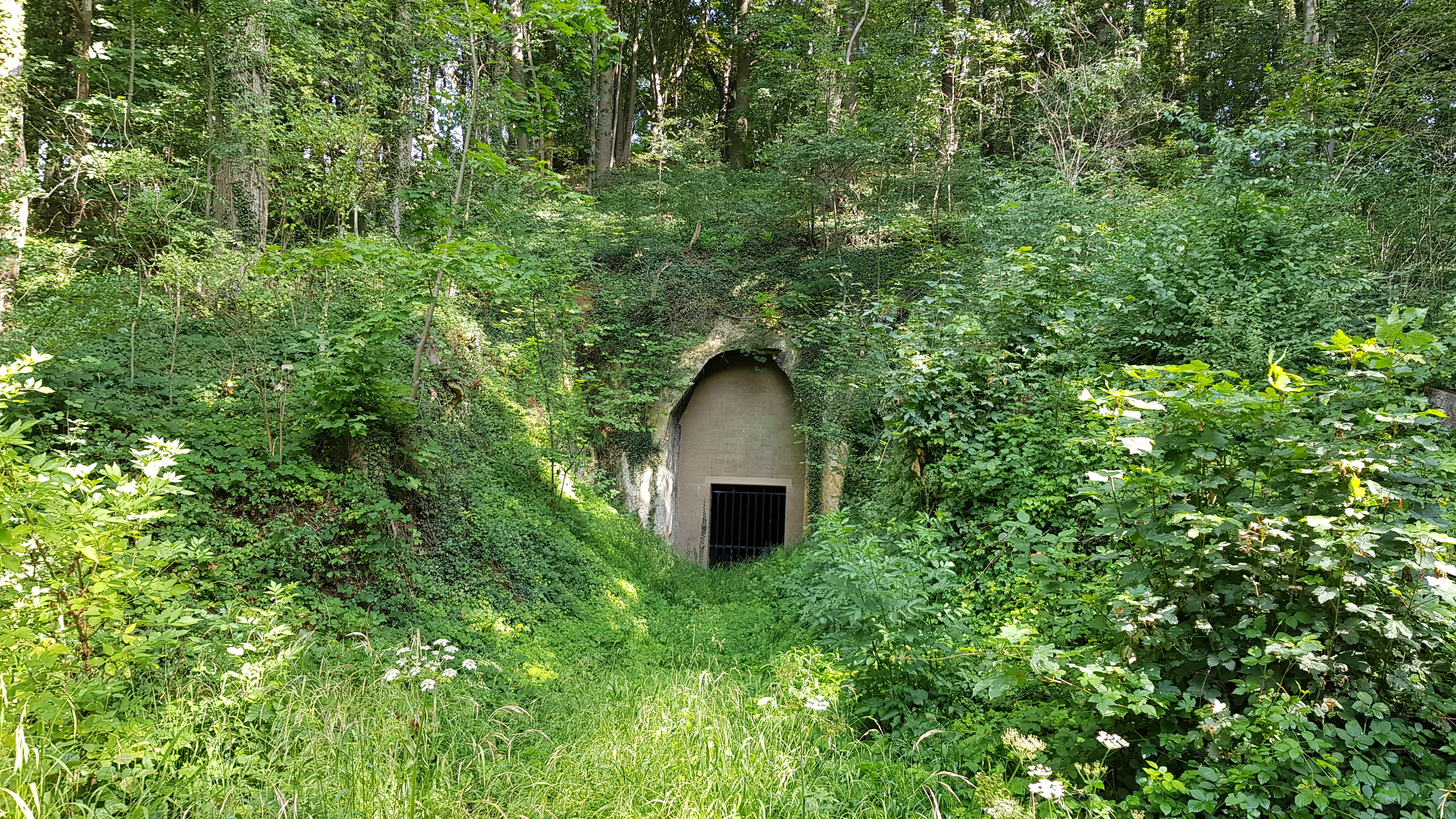 Mettenberggroeve V, Bemelen, Nederland